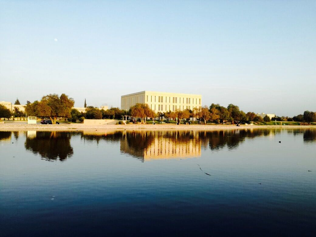 البركة الصمناعية في جامعة العلوم والتكنولوجيا،الاردنTemplate:Wiki Loves Earth Jordan